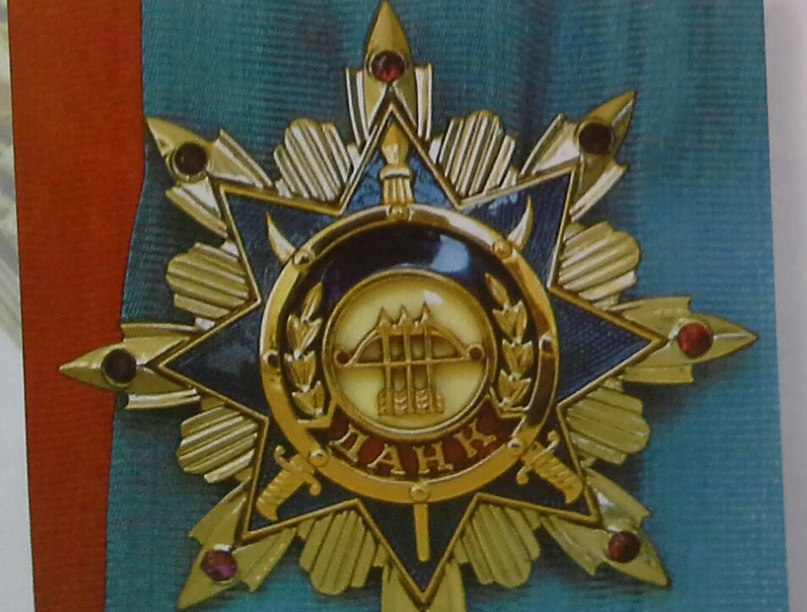 Қазақша (кирил): "Даңқ" ордені